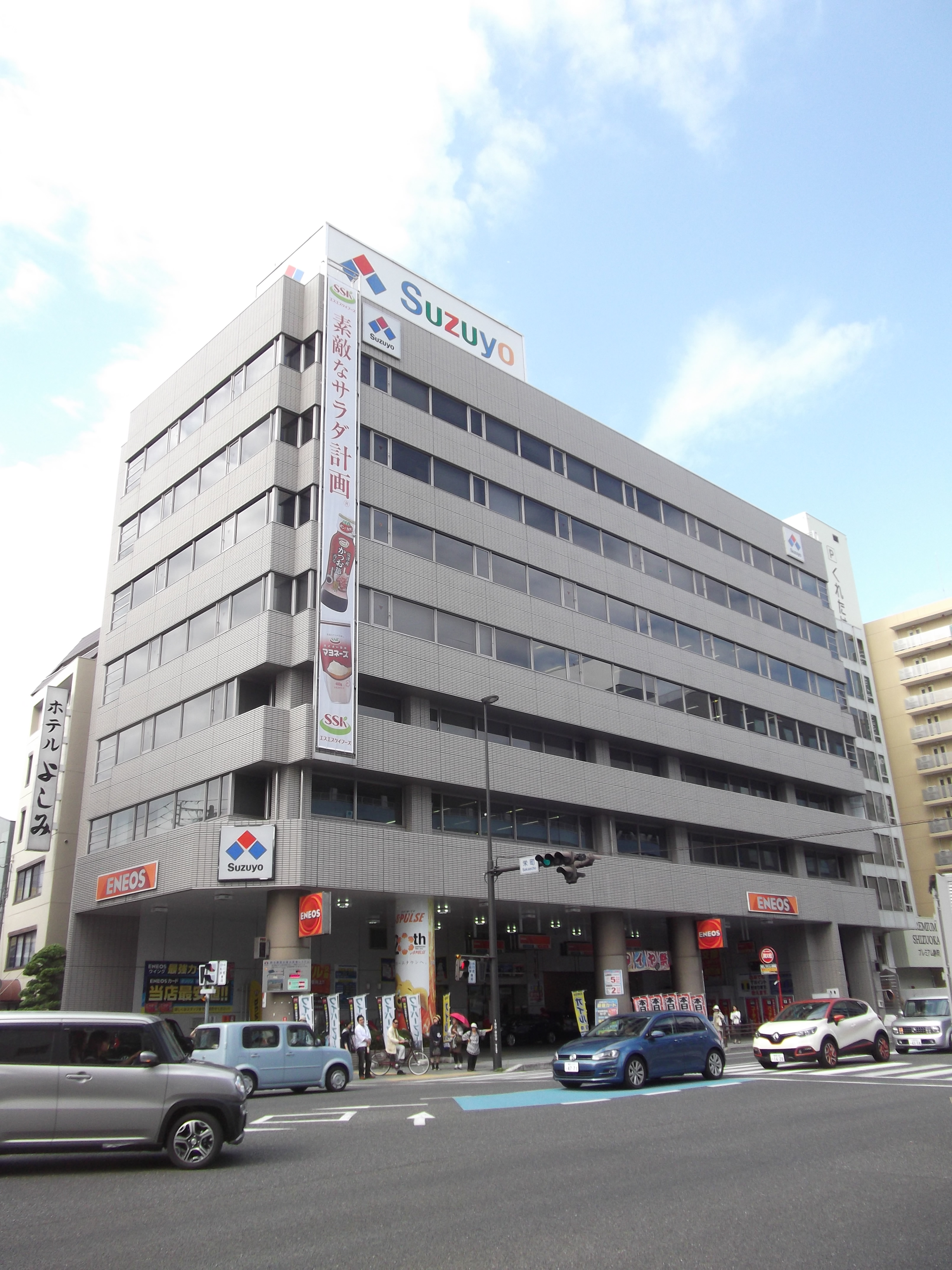 鈴与静岡ビル。